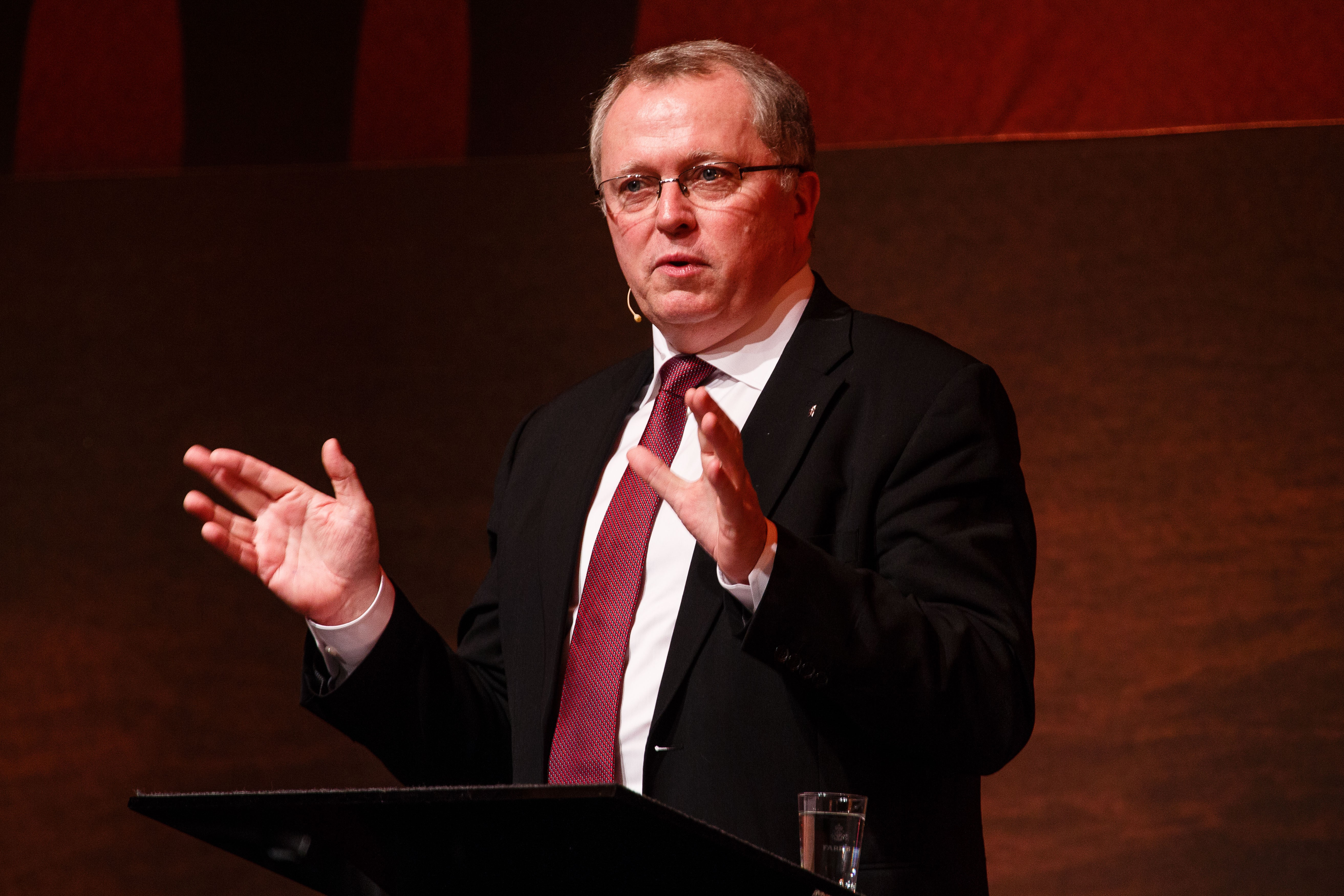 Statoils konsernsjef Eldar Sætre holder tale på Norsk olje og gass' årskonferanse 5. mars 2015. #Brytningstid